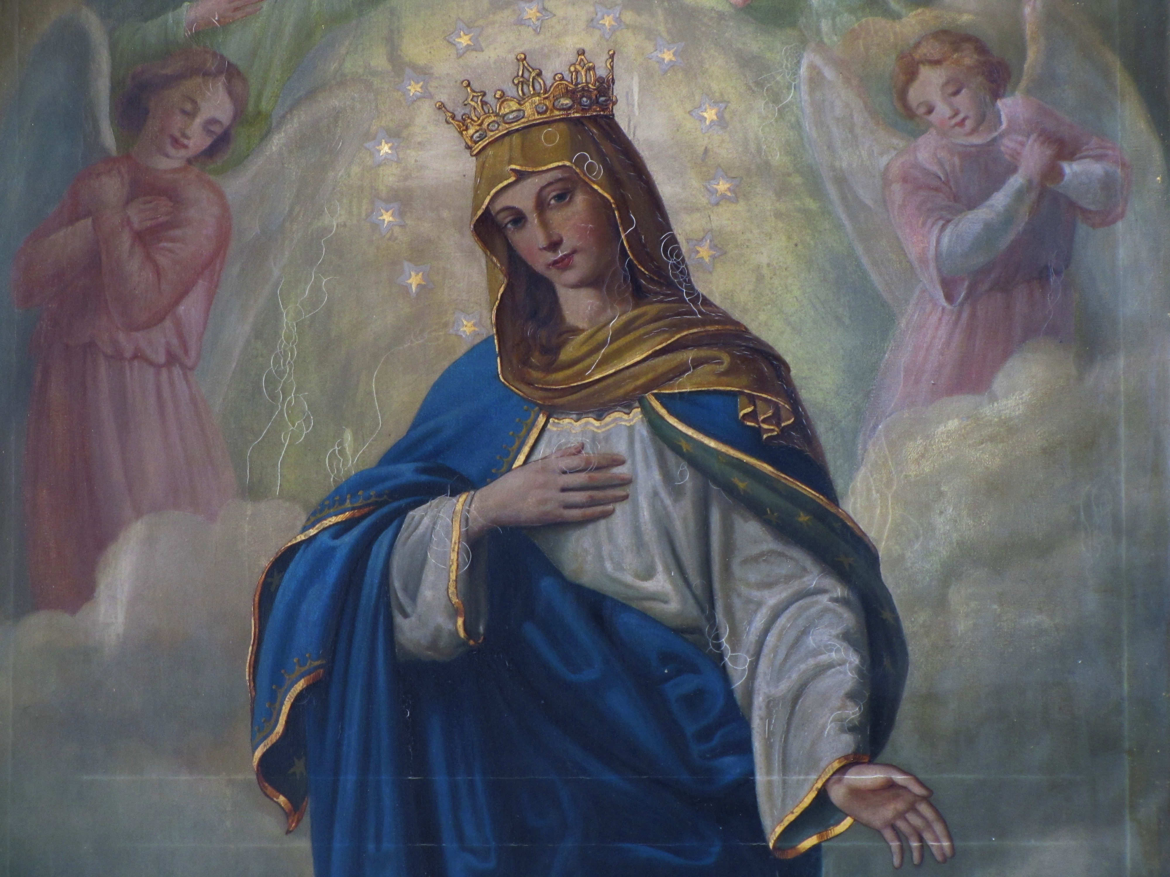 Alsace, Bas-Rhin, Église St Kilian de Dingsheim (IA67005517). Tableau "Vierge Marie" (P.ORTICARI, huile sur toile, 267x140, 1927)